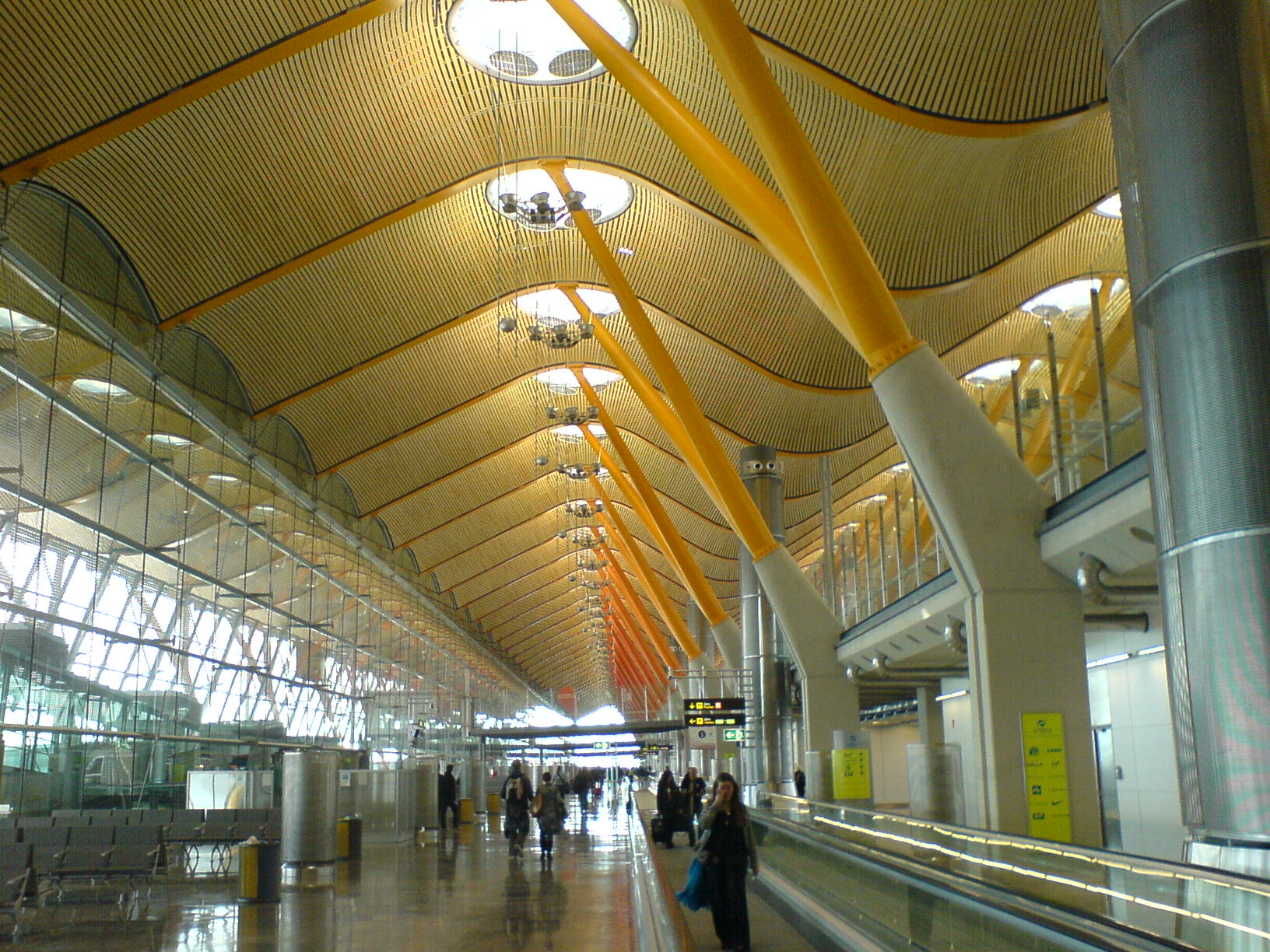 Imagen tomada en la terminal 4 del Aeropuerto de Madrid-Barajas / Image taken at Terminal 4 of Madrid-Barajas Airport